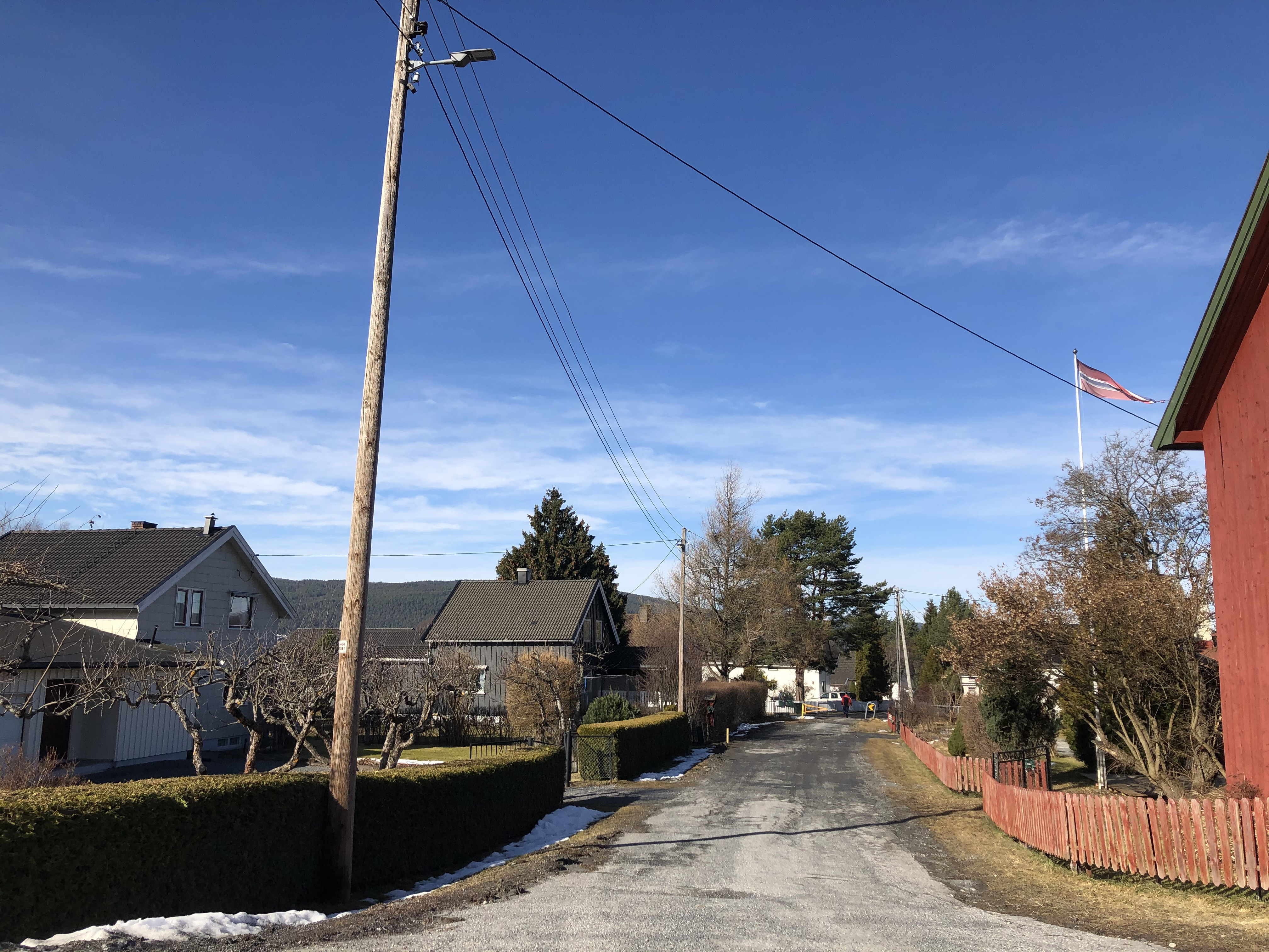 Tosogata, Jevnaker